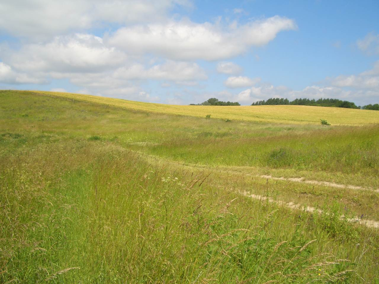 Naturschutzgebiet Peenewiesen bei Gützkow. Nährstoffeintrag aus benachbarten Ackerflächen. Erkenntlich an Ruderalvegetation (z.B. Holunder, Brennnessel).